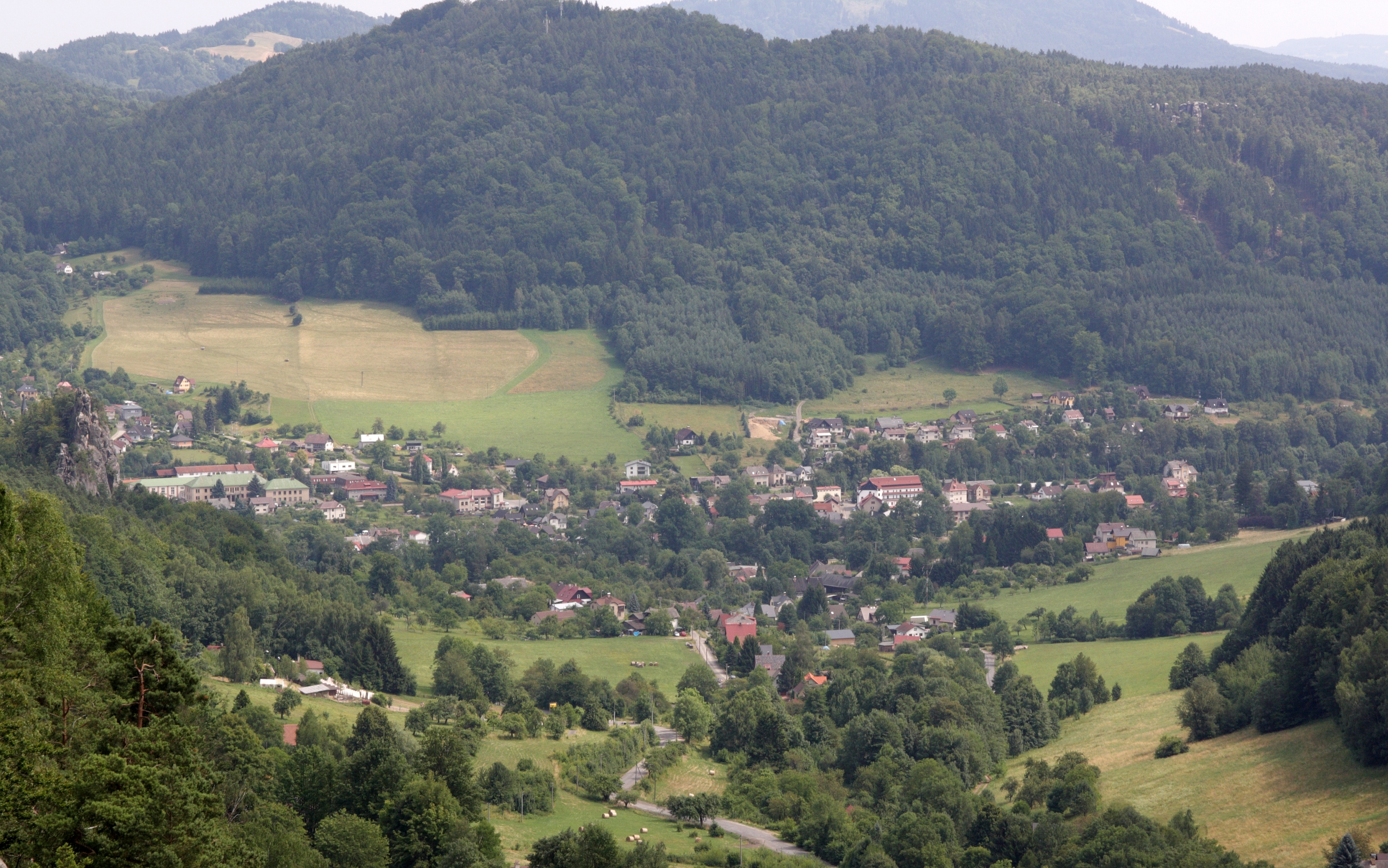 Malá Skála - pohled z hradu Frýdštejn na Vranové a vrch Sokol.